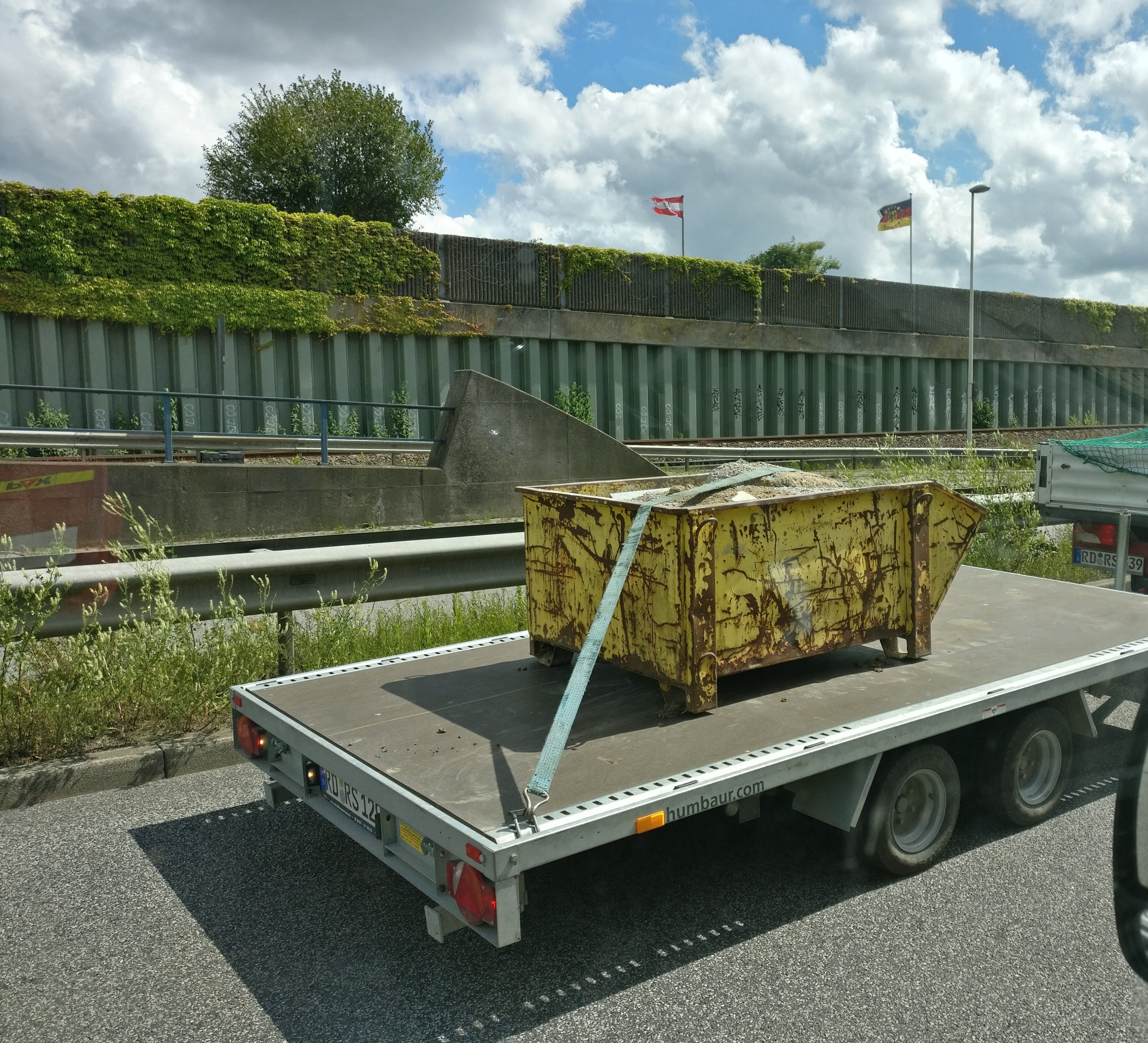 Blick auf einen PKW-Anhänger mit einer nicht fachgerechten Ladungssicherung.